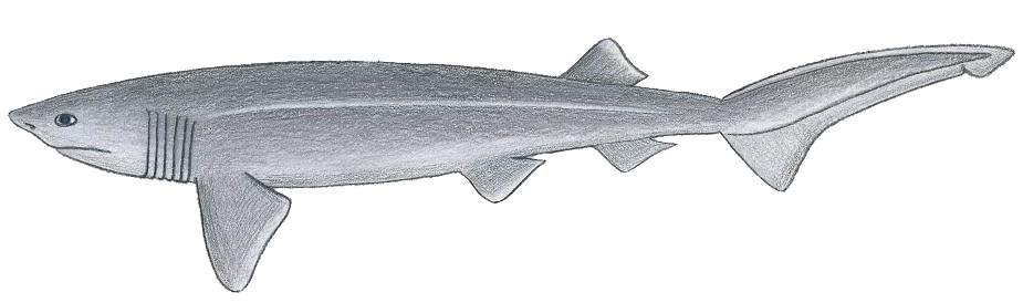 Pas glavonja. Srpskohrvatski / српскохрватски: Pas glavonja.